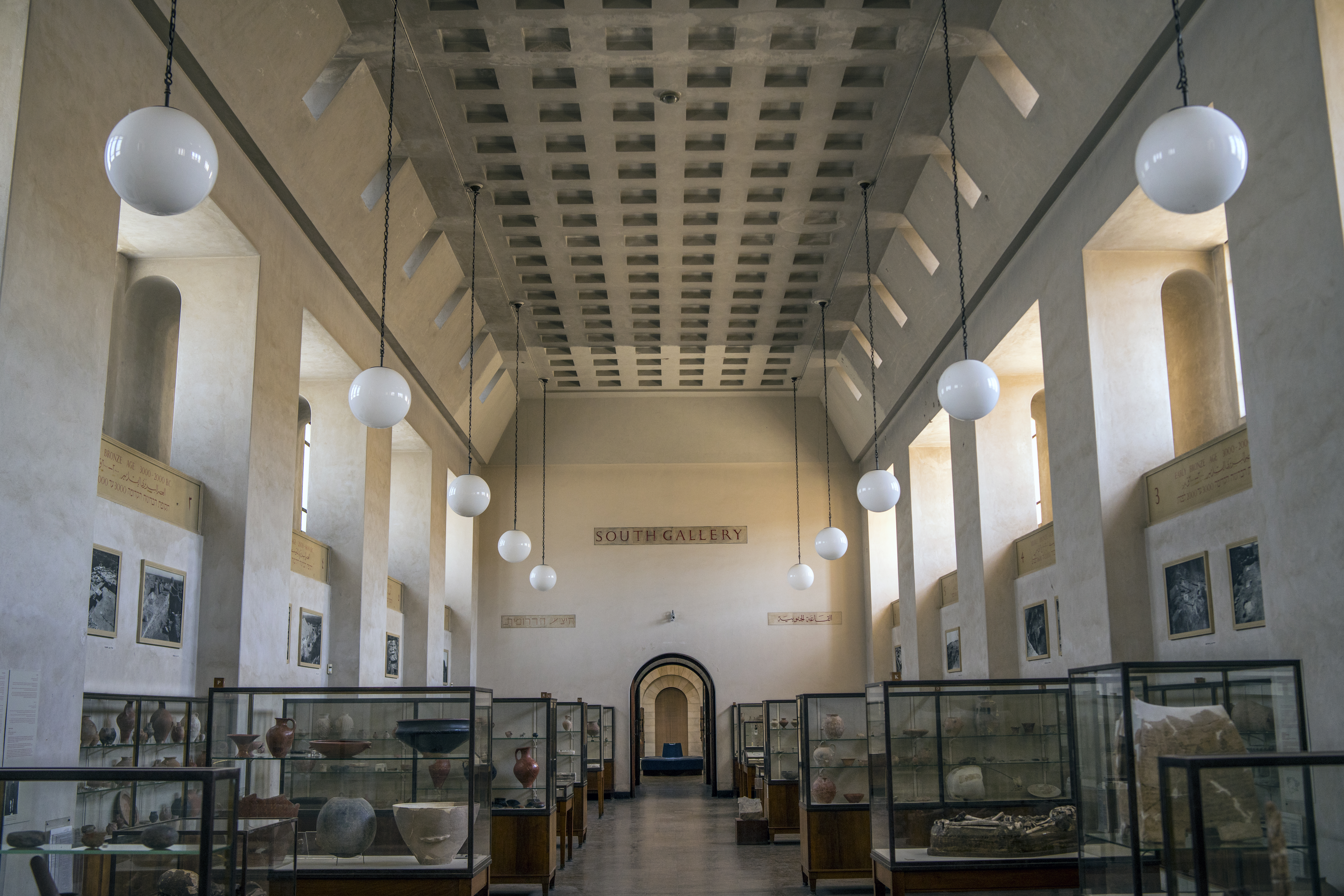 מוזיאון רוקפלר הוא מוזיאון לארכאולוגיה, חלק ממוזיאון ישראל, המכיל פריטים ארכאולוגים חשובים רבים מארץ ישראל. נמצא במזרח ירושלים, מול שער הפרחים. במבנה שוכנים גם משרדי רשות העתיקות. כולל גגות מעוטרים בכיפות ומגדל מתומן המתנשא מעל הכניסה הראשית.